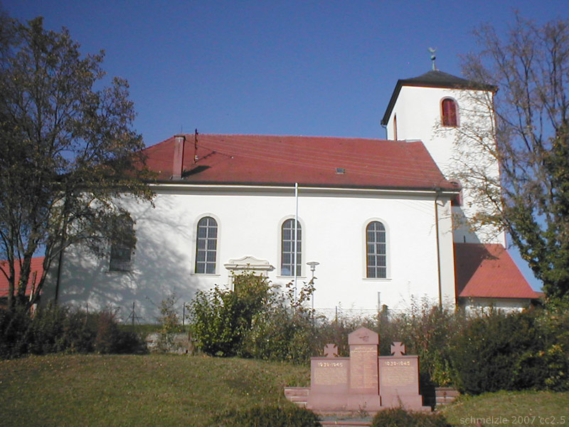 Evangelische Kirche in Mosbach-Lohrbach, Baden-Württemberg, Deutschland